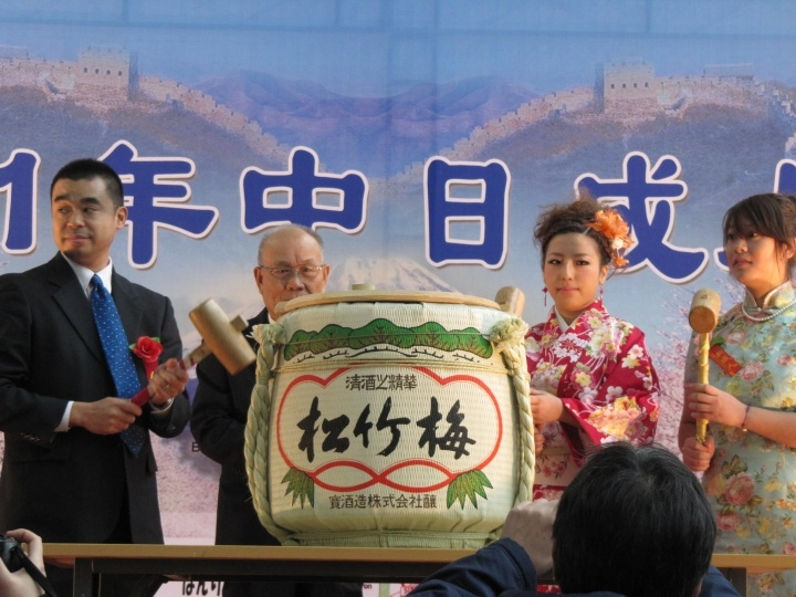 参加中日成人礼。